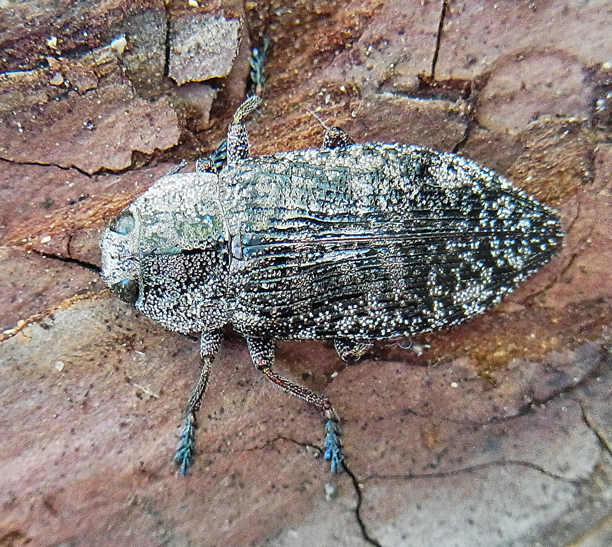 Poecilonota variolosa aus Spanien, Katalonien, La Llacuna, Camping Vilademager am 15. Juni 2013